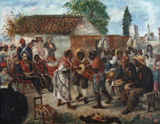 "Candombe federal", cuadro de Martín Boneo (1829-1915). Argentina.